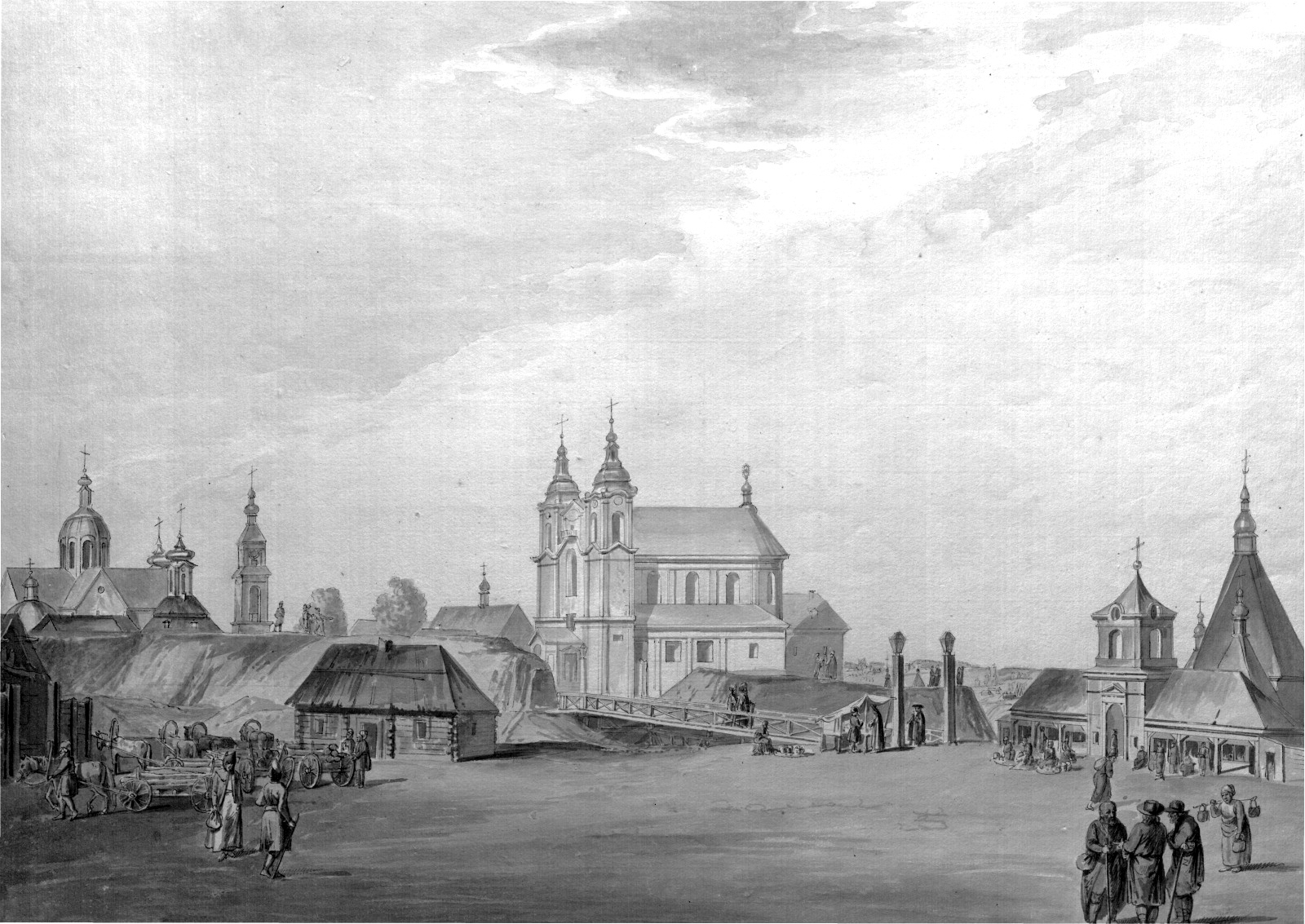 Выгляд горада Магілёва ў канцы ХVІІІ — пачатку ХІХ стБеларуская (тарашкевіца): Магілёў (Mahiloŭ). Акварэль Юзэфа Пешкі (Juzef Pieška)